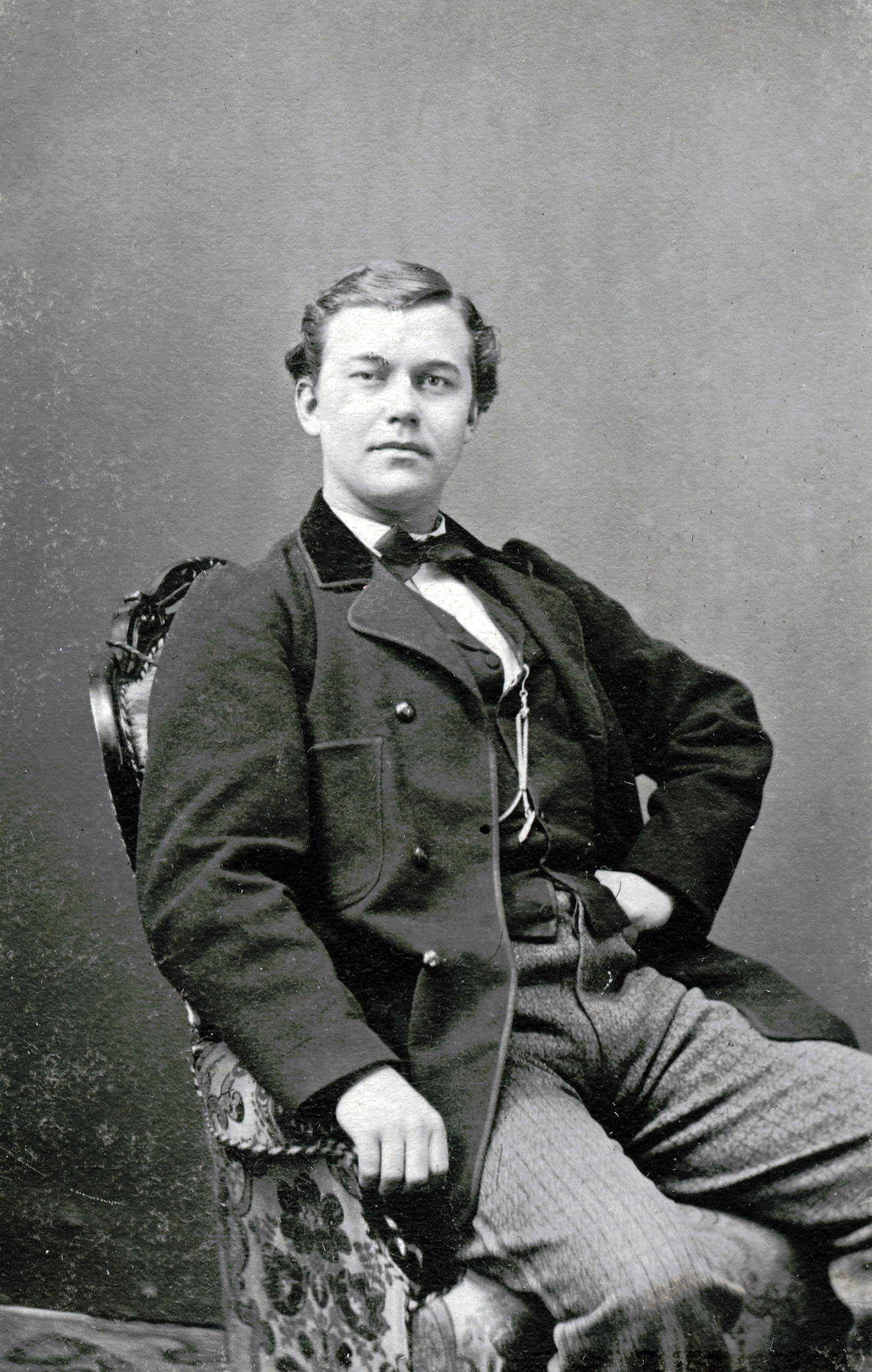 Axel Bosin, skådespelare vid Mindre teatern 1869-70